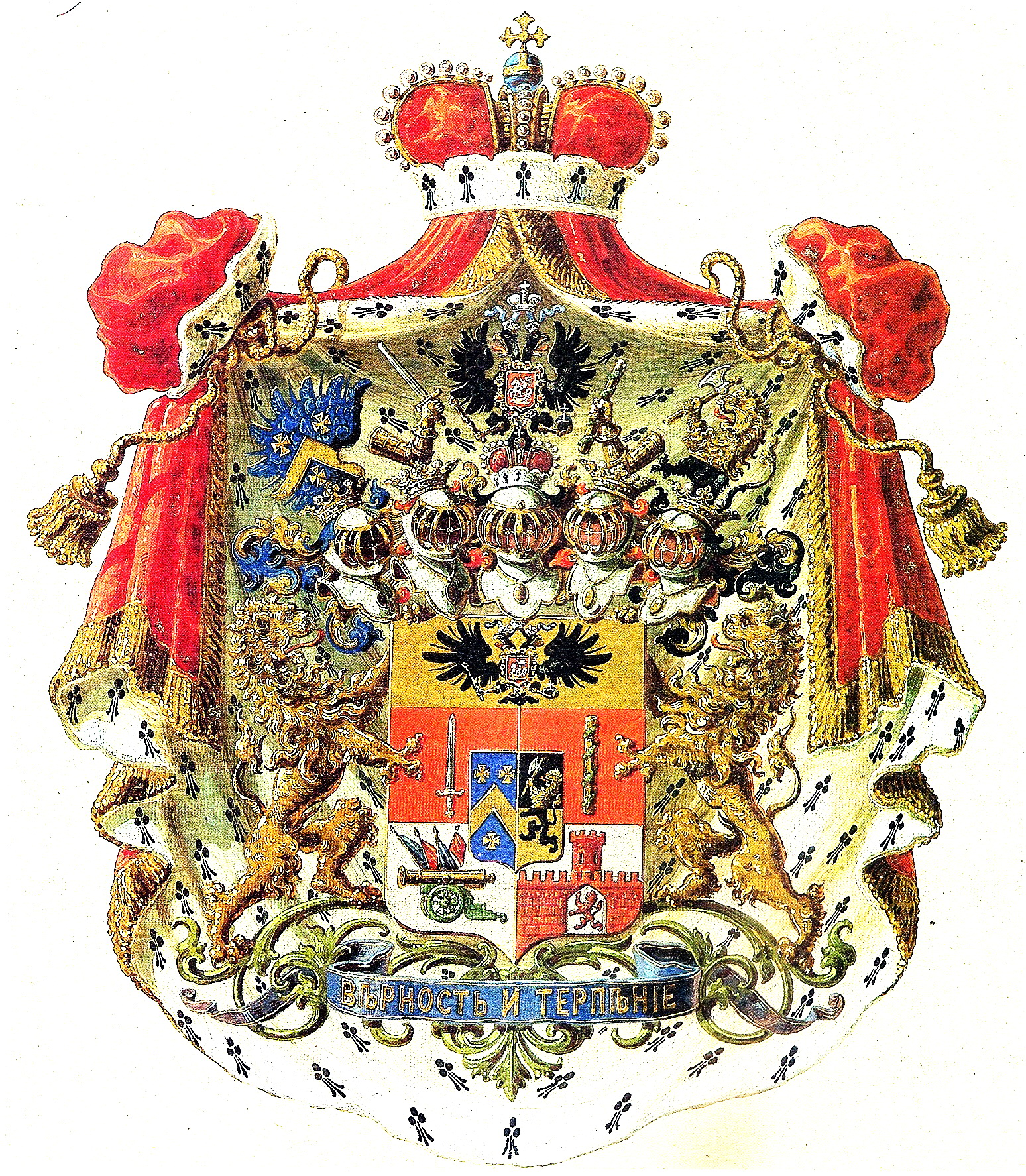 Герб князей Барклай-де-Толли-Веймарн